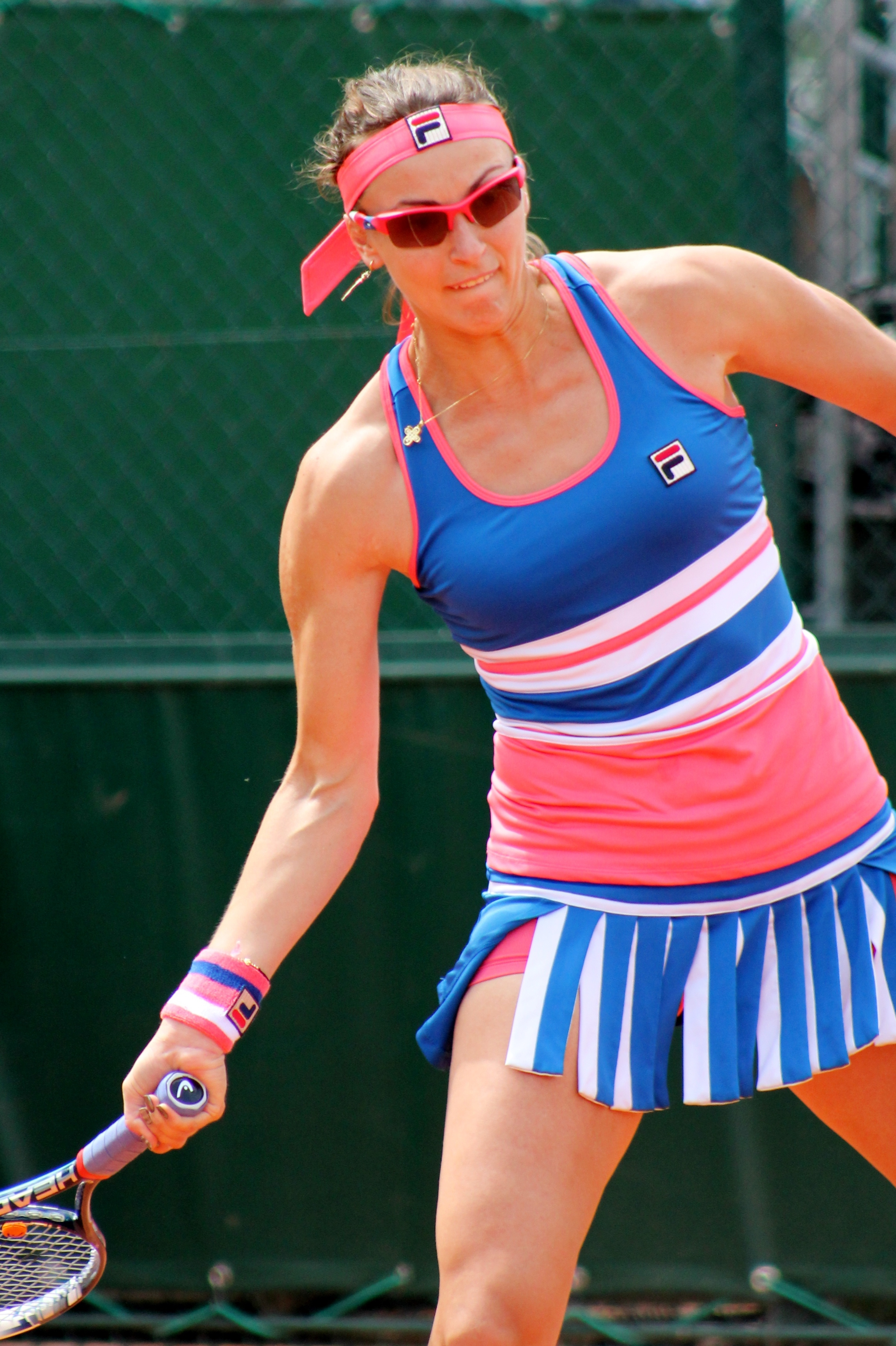 Shvedova RG13 (4)